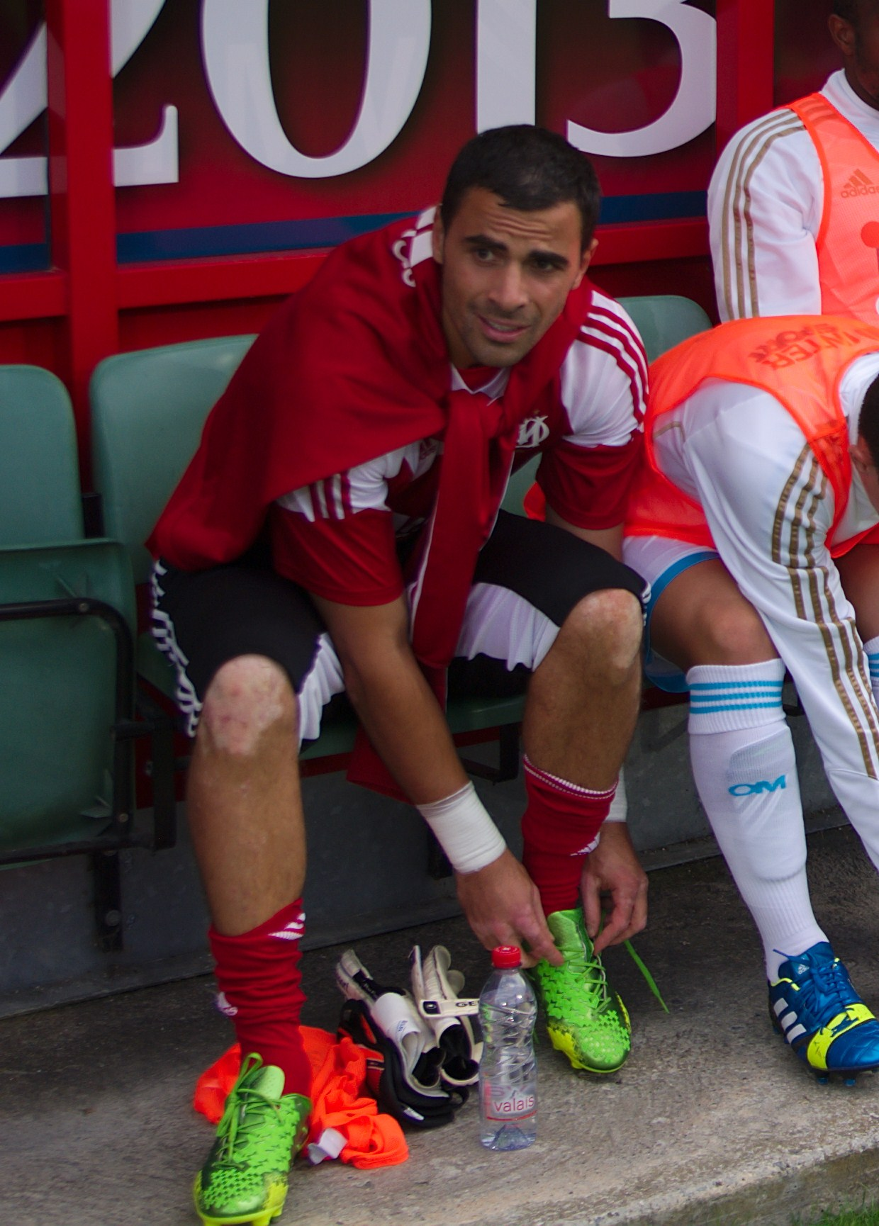 Gennaro Bracigliano